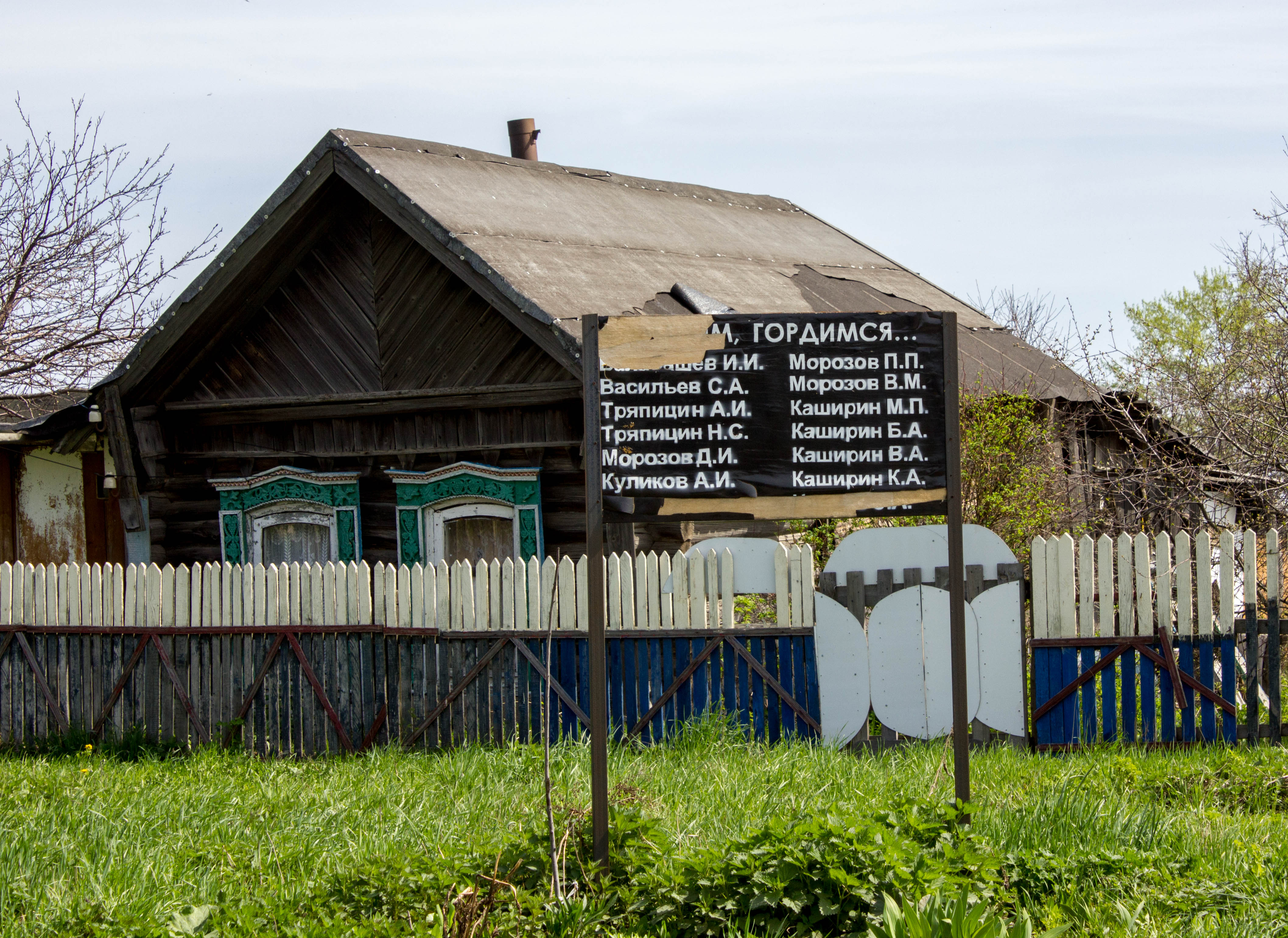 Доска гордости